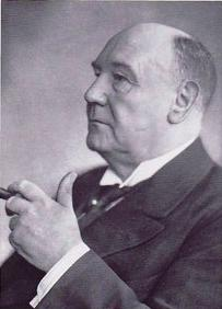 Außenminister Wilhelm Solf